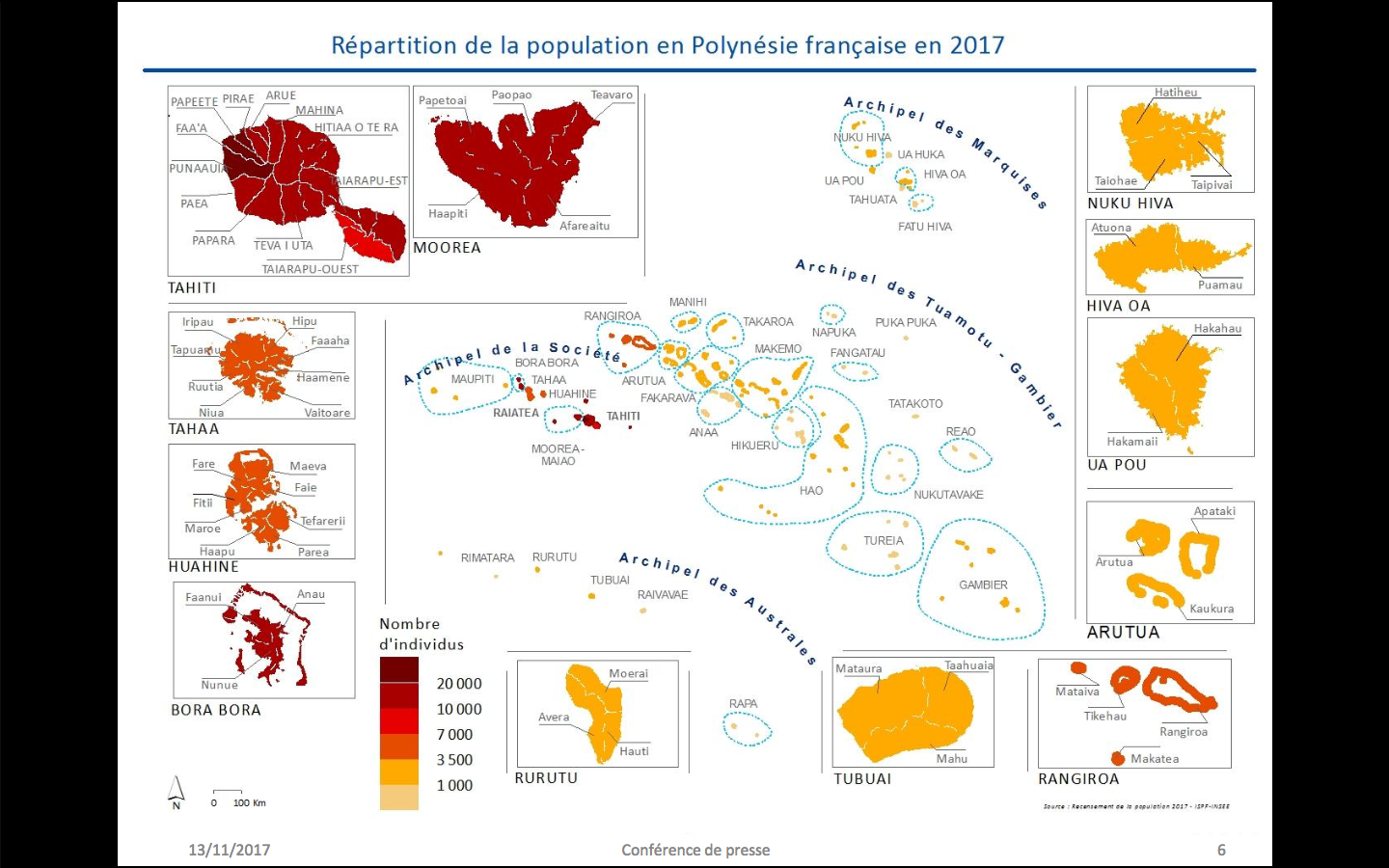 Répartition de la population en Polynésie française (2017), source: INSEE